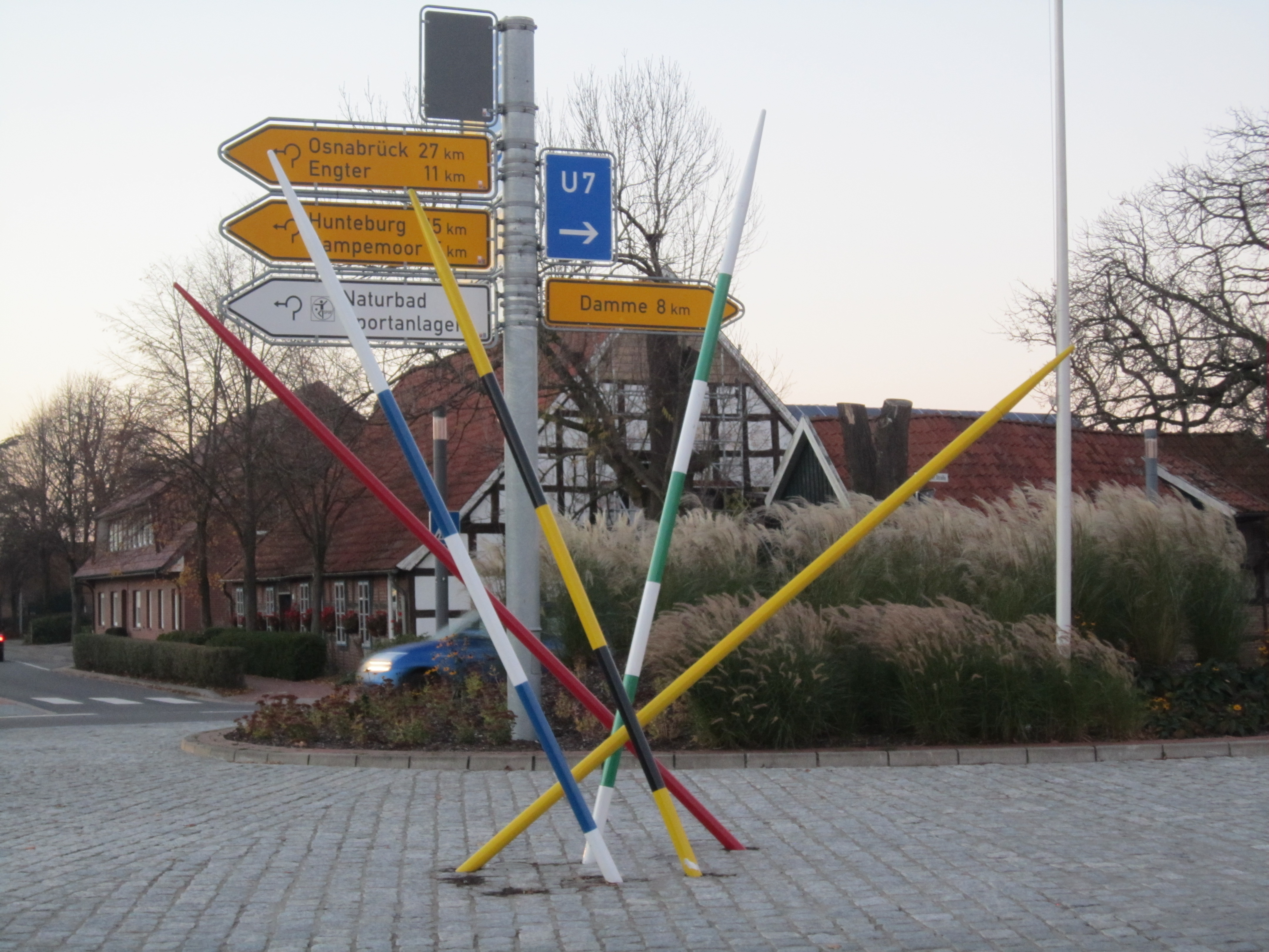 "Mikadostäbe" in einem Kreisverkehr in Vörden (Landkreis Vechta, Niedersachsen)